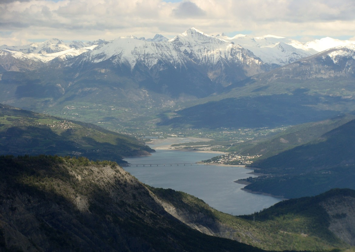 Le massif du Parpaillon vu du sommet du Mont Colombis, par-delà la retenue de Serre-Ponçon.